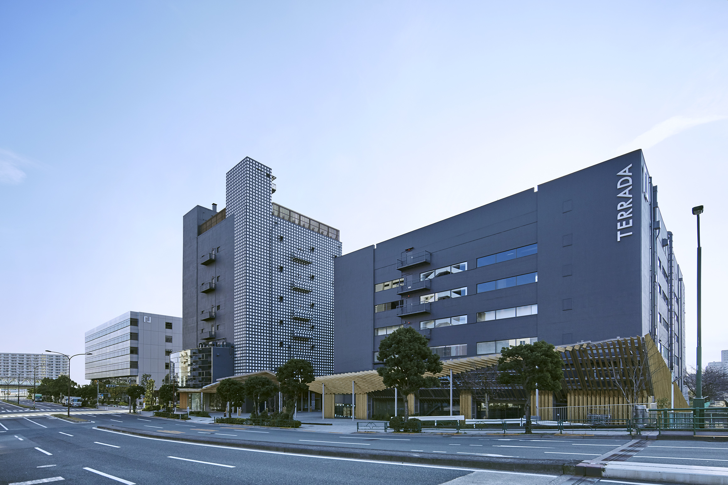 寺田倉庫本社ビル